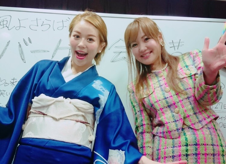 左 わさびちゃん 右 上原正子